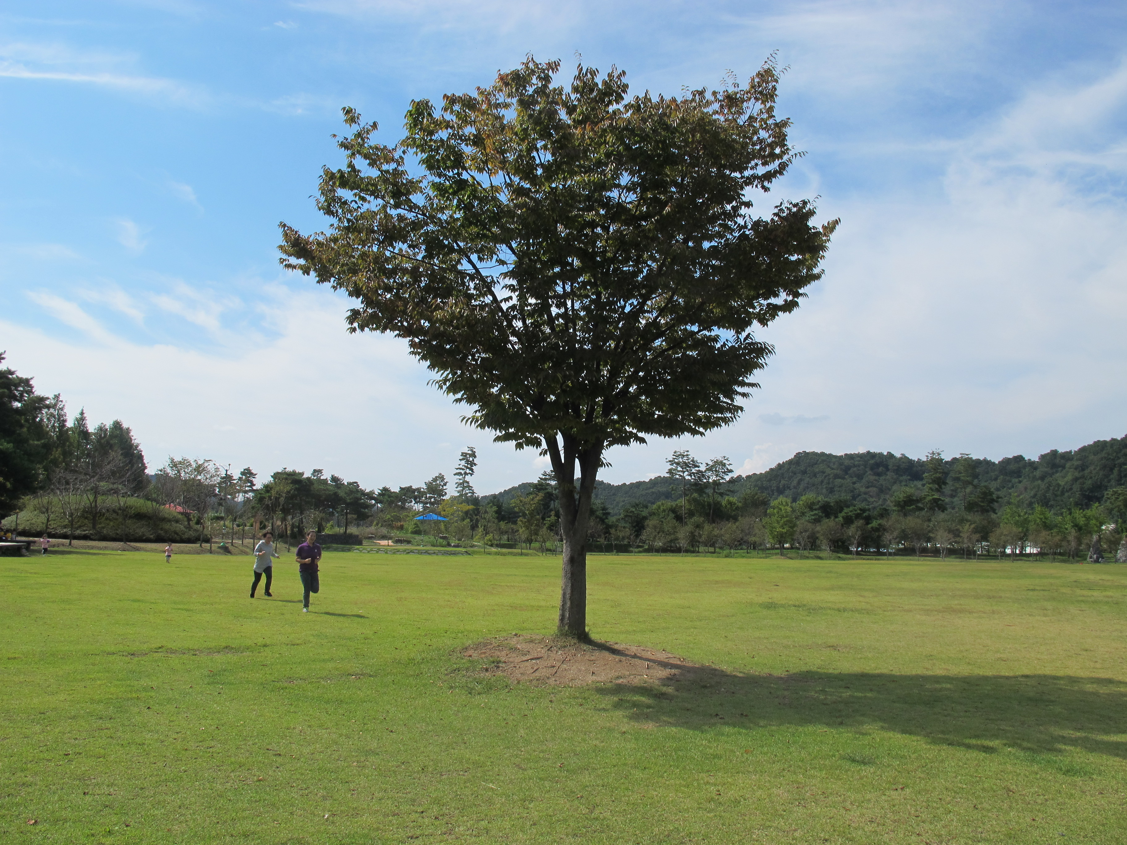 대청호오백리길 21구간_2